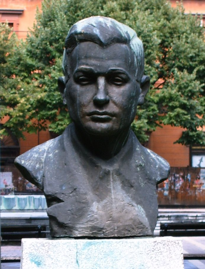 Csáth Géza mellszobra Szabadkán. Saját fénykép. Szabadka, 2006. augusztus 14.